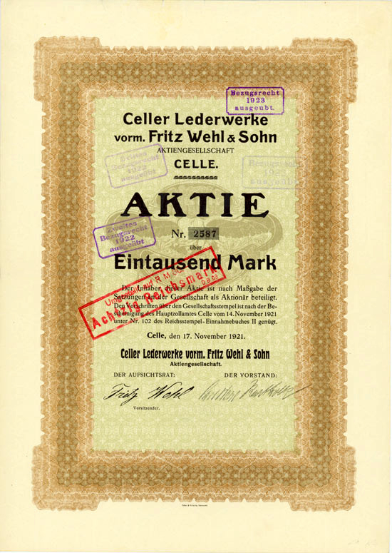 Aktie der Celler Lederwerke vorm. Fritz Wehl & Sohn Aktiengesellschaft, Celle vom November 1921 mit einer Unterschrift des damaligen Aufsichtsrat-Vorsitzenden Fritz Wehl sowie des Vorstandes ... Laut Beschreibung des Auktionators dieser Aktie wurde die Gerberei und Lederfabrik 1910 gegründet - vermutlich war jedoch lediglich die Umwandlung in eine AG gemeint ...